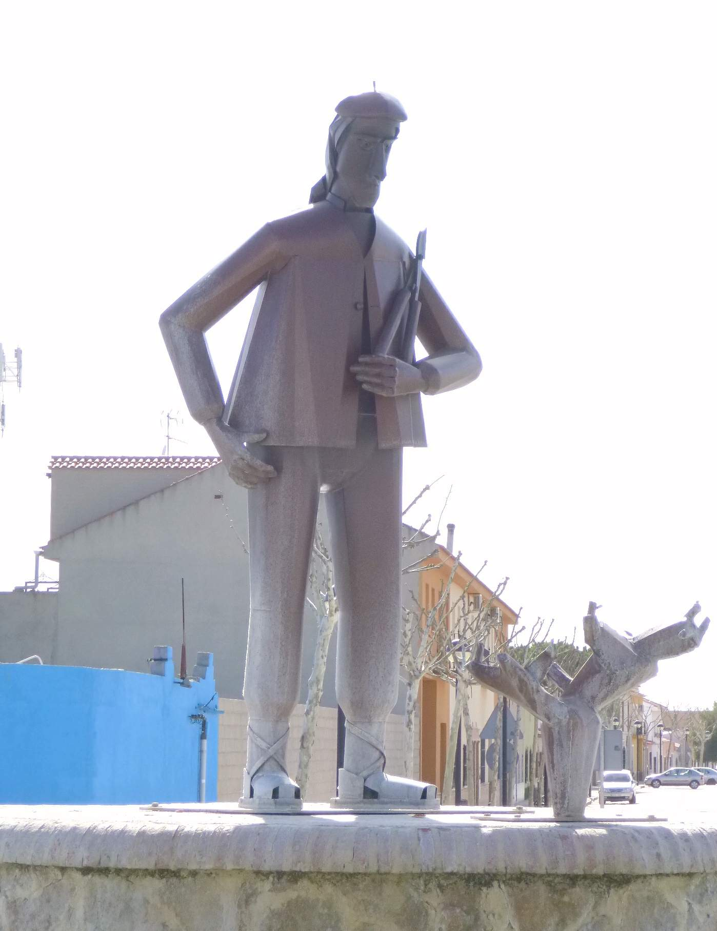 Socuéllamos (Ciudad Real)